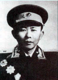 曾韶山将军1955年受勋照